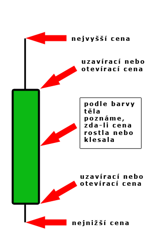 popis svícového grafu